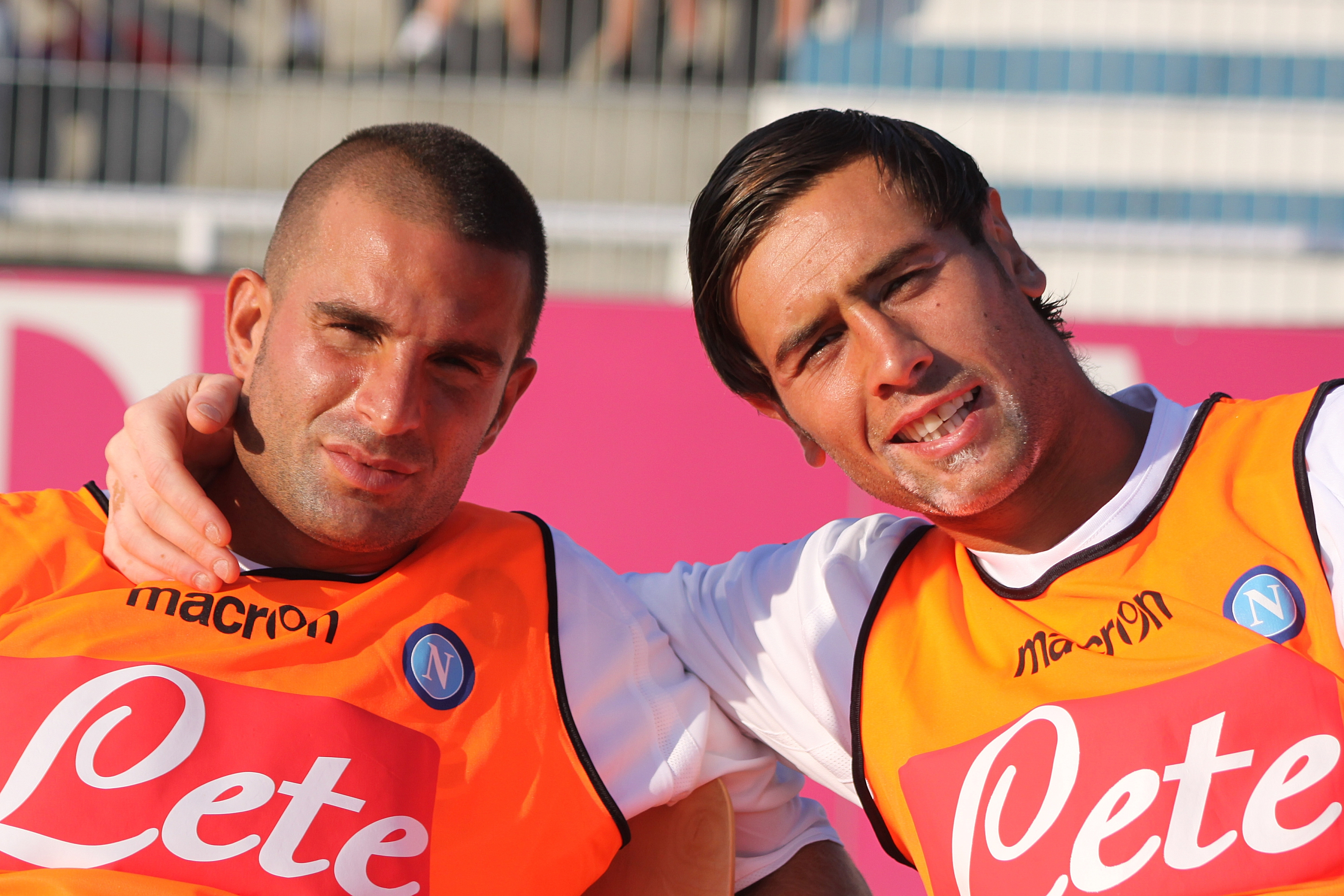 Manuele Blasi (links) & Leandro Rinaudo - SSC Neapel (rechts) Manuele Blasi & Leandro Rinaudo - Società Sportiva Calcio Napoli